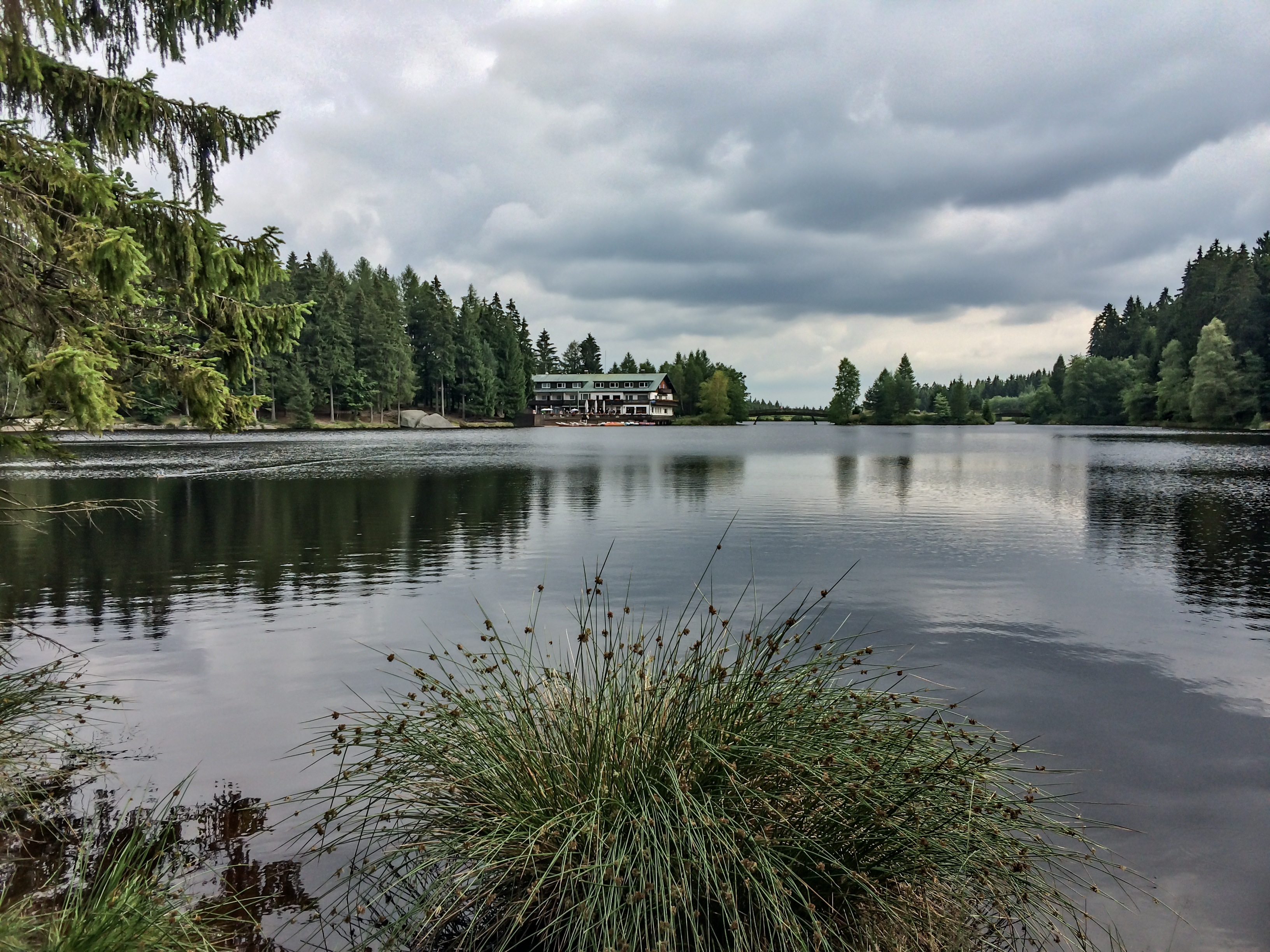 Fichtelsee Juli 2014